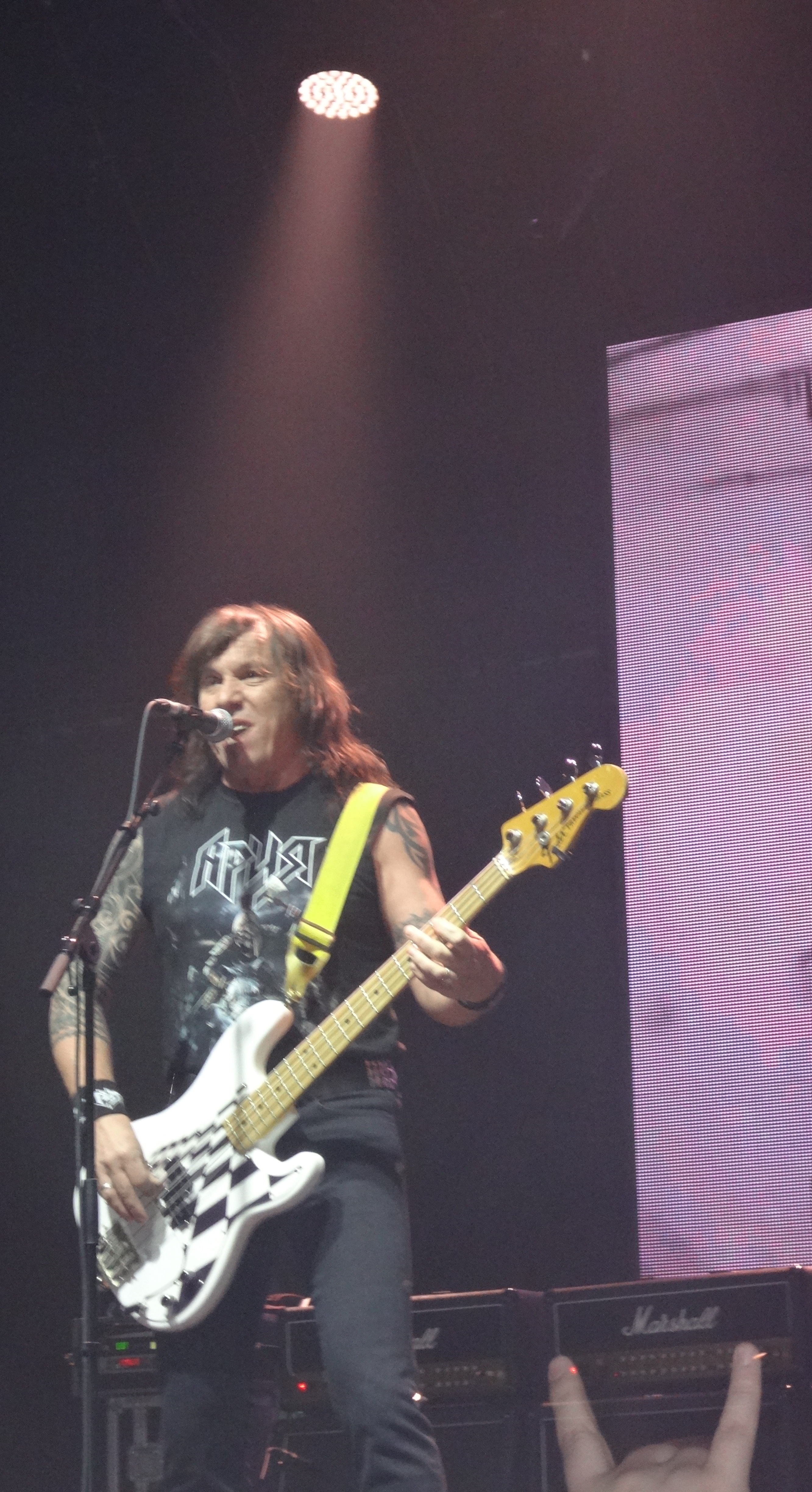 Виталий Дубинин - бас-гитара, бэк-вокал